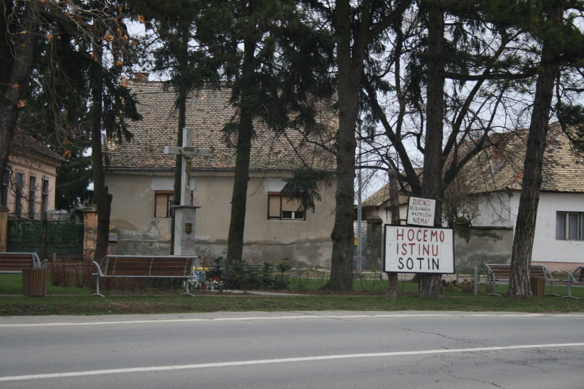 Sotin, spomen obilježje